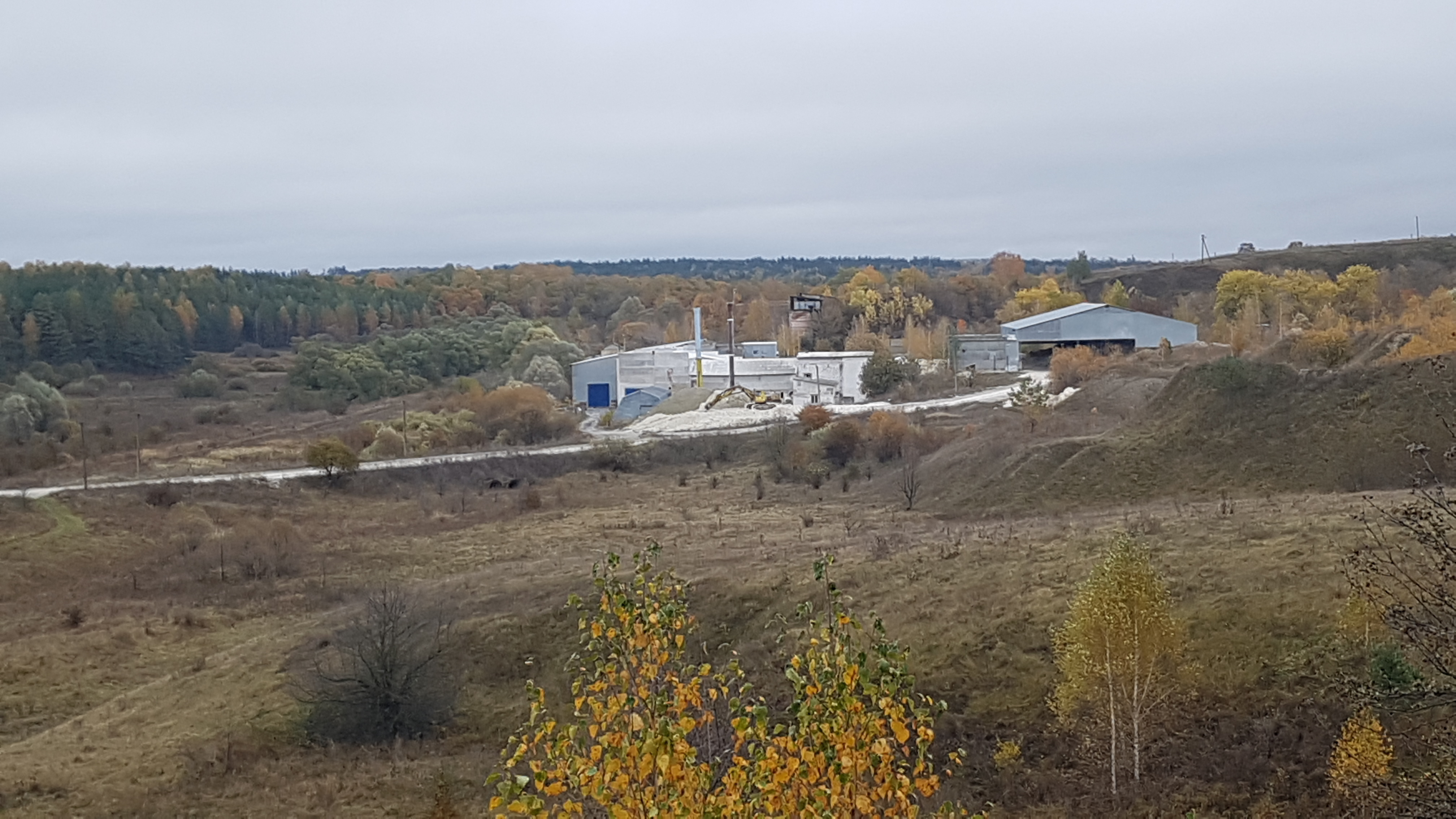 Вигляд на млин Заруцького вапнового заводу, с. Будівельне 15.10.2017